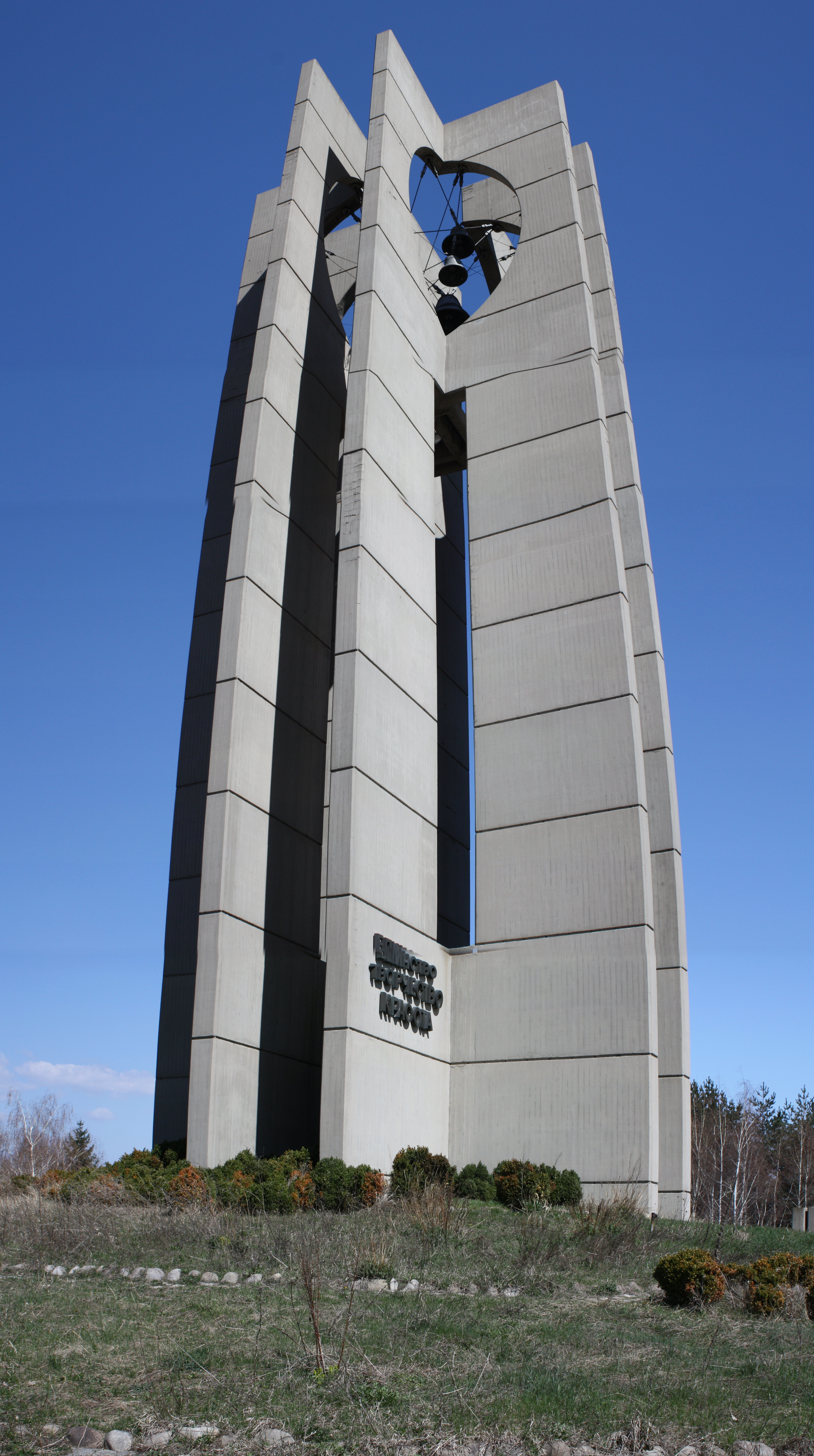 The bells, Die Glocken, Kambanite, Sofia, Bulgaria, Камбаните, София